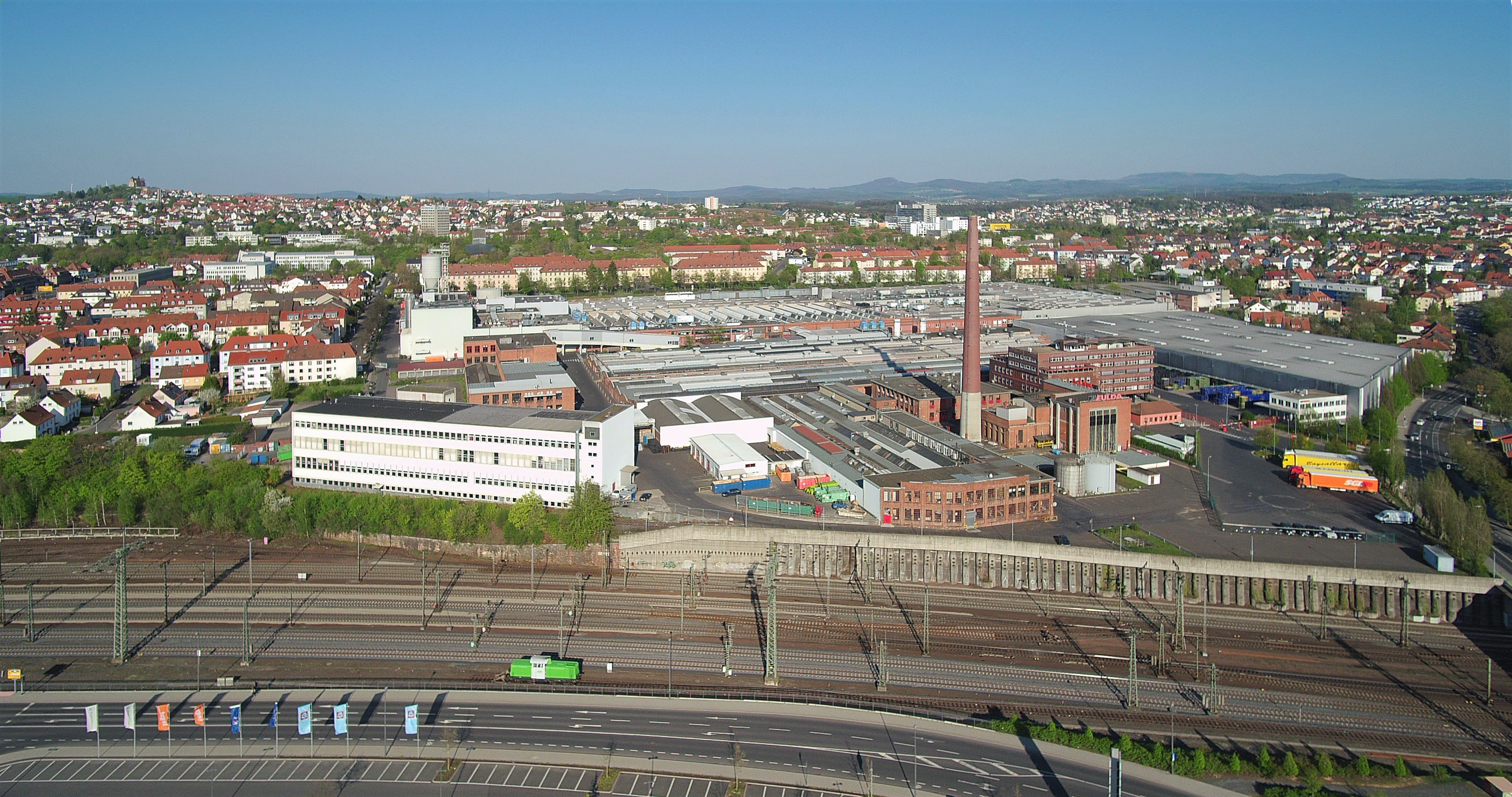 Werksgelände Fulda Reifen. Dahinter die ehemalige Konrad-Kaserne -heute Gallasiniring im Stadtteil Ziehers Süd.